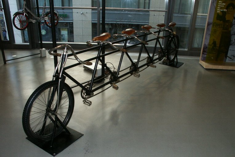 Opel bicycle